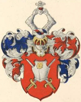 Silfverharniski suguvõsa aadlivapp